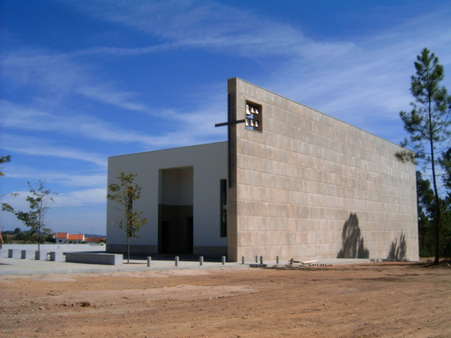 Descrição Igreja de Carvalhal fonte e créditos ©Manuel Anastácio - para a wikipédia Licença